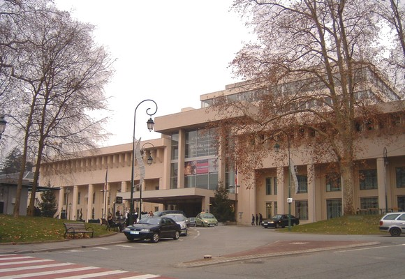 Les Thermes nationaux de la station thermale d'Aix-les-Bains en France dans le département de la Savoie.